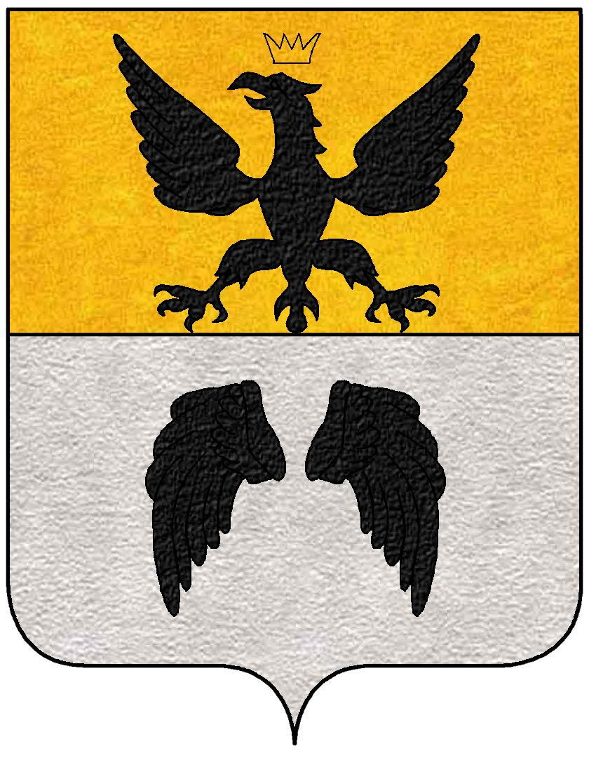 Stemma della famiglia Arese